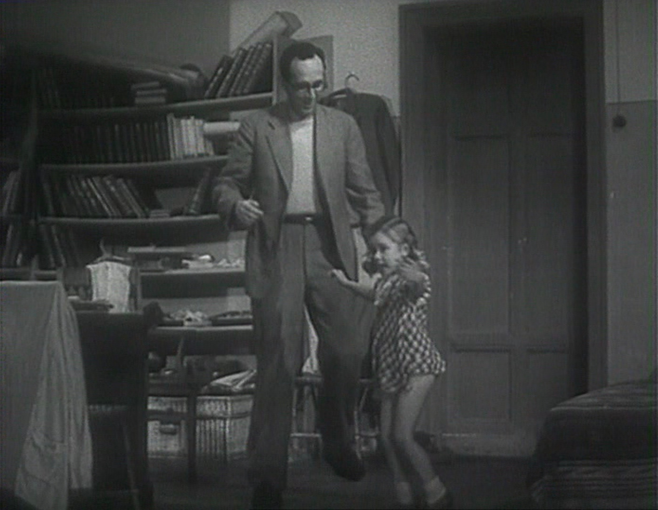 «Подкидыш» — художественный фильм производства киностудии «Мосфильм» 1939 года. Один из самых первых семейных фильмов в Советском Союзе, сценаристами которого стали актриса Рина Зелёная и писательница Агния Барто. Ростислав Плятт